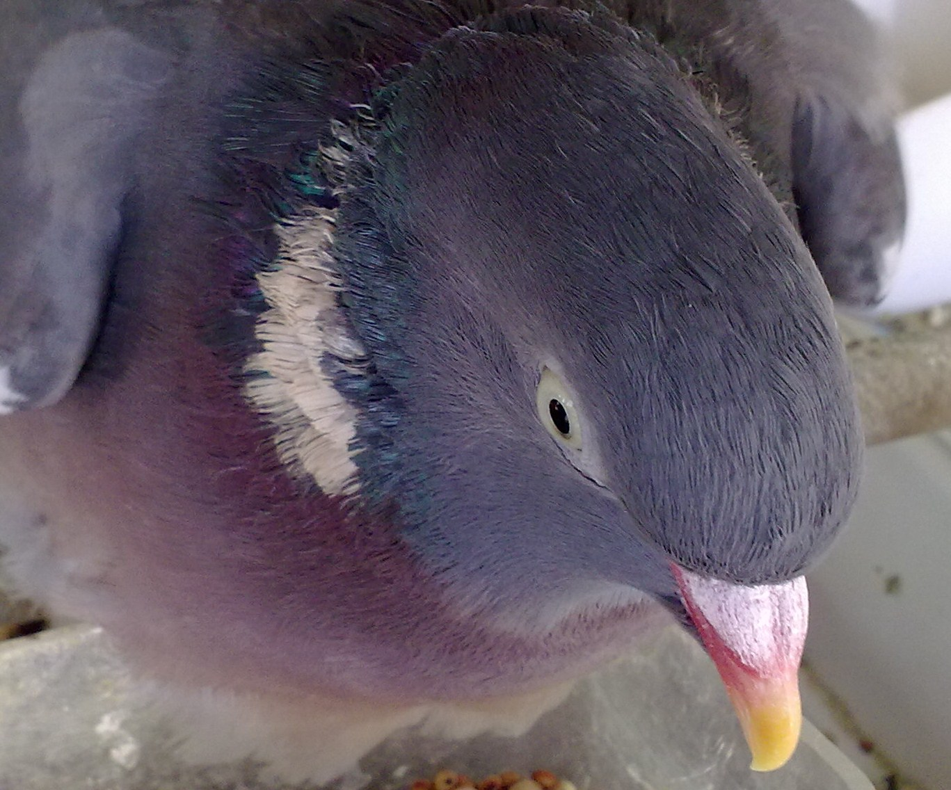 Détail de la tête d'une palombe, elle a au moins 7 ans, elle a été capturé dans les Pyrénées Atlantiques, France